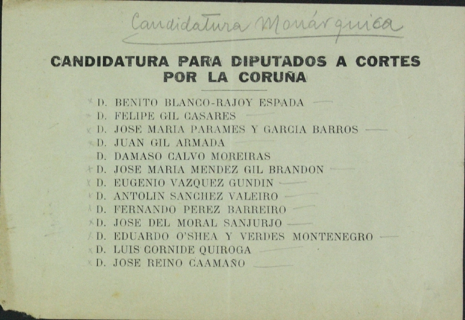 Candidatura dereitista para deputados a Cortes pola provincia da Coruña para as eleccións xerais de febreiro de 1936